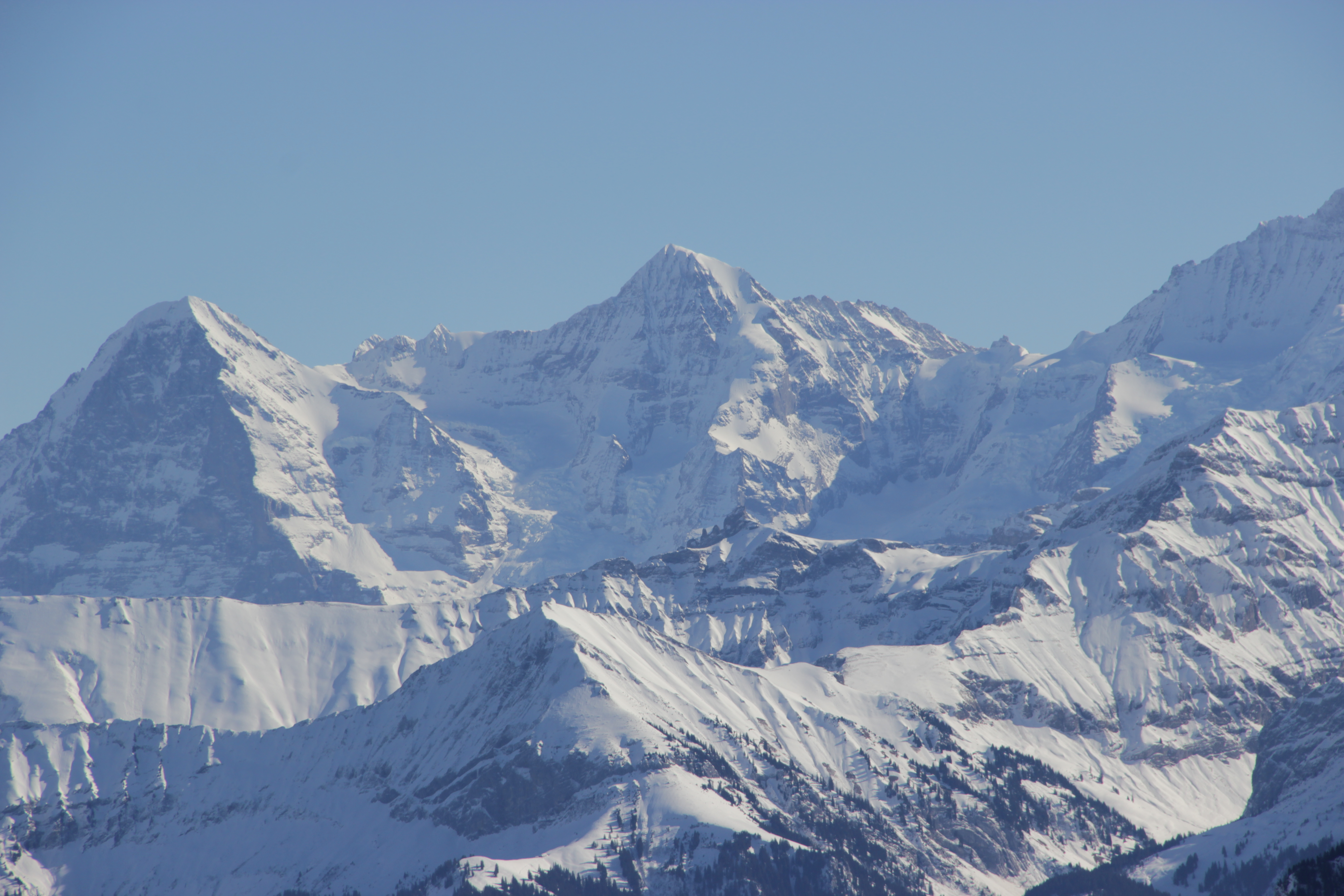 Eiger and Mönch